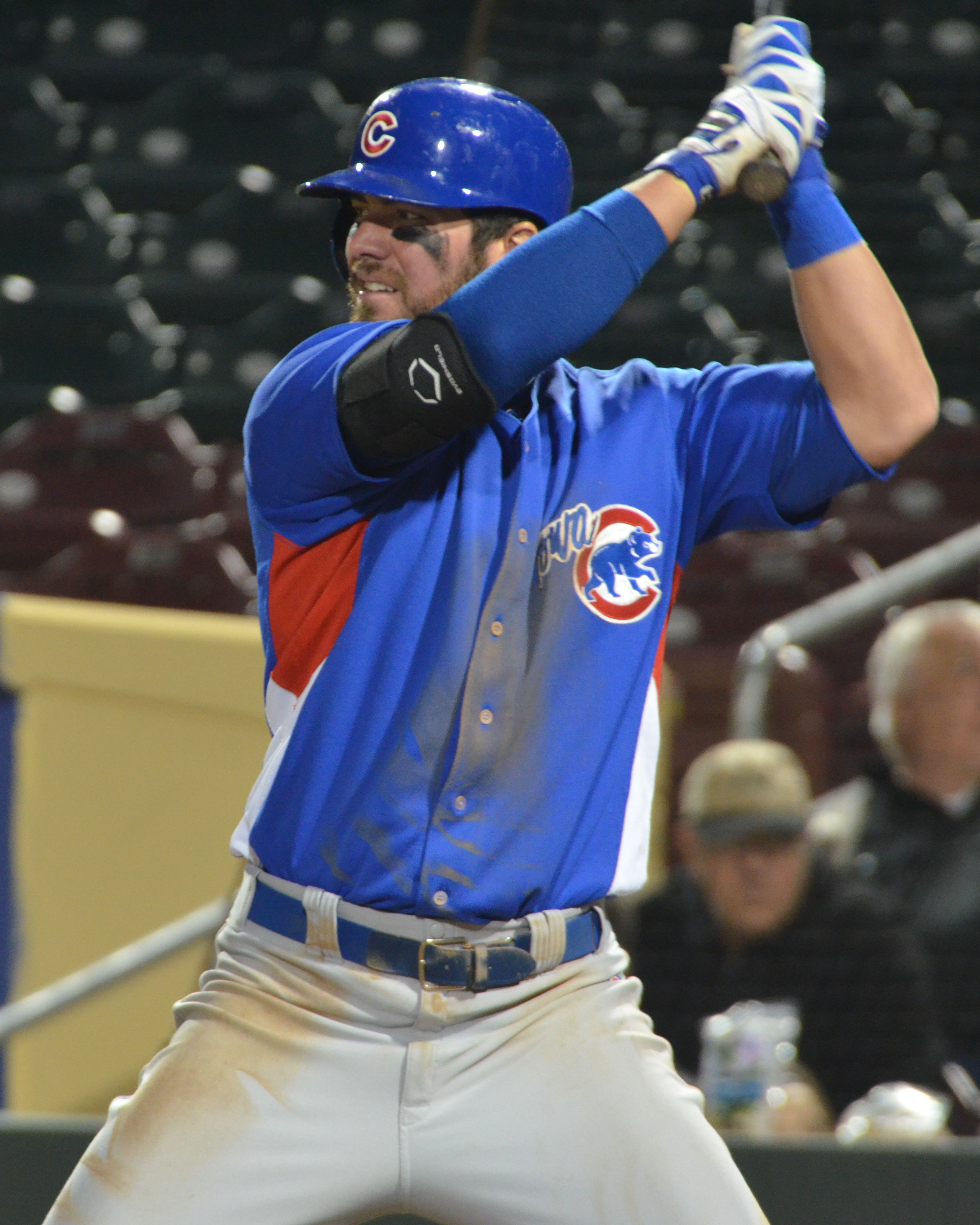 Ian Stewart